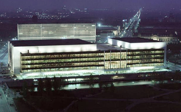 ADN-ZB / Kohls / 21.8.1976 / Berlin - Hauptstadt der DDR / Der Palast der Republik am Abend.